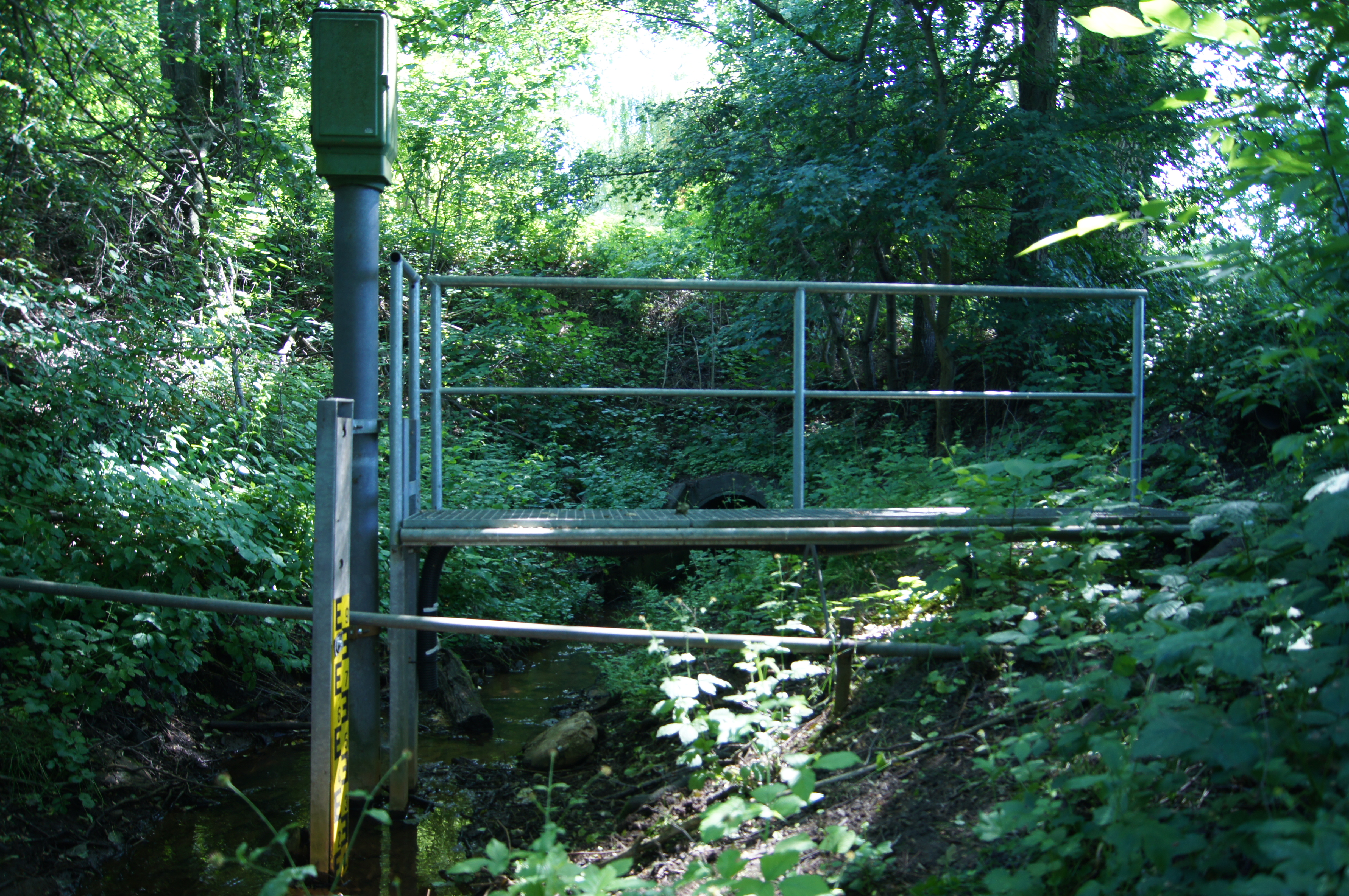 Pegel Frankfurt (Oder) Westkreuz an der Klinge. Beginn der Untertunnelung der Fürstenwalder Poststraße